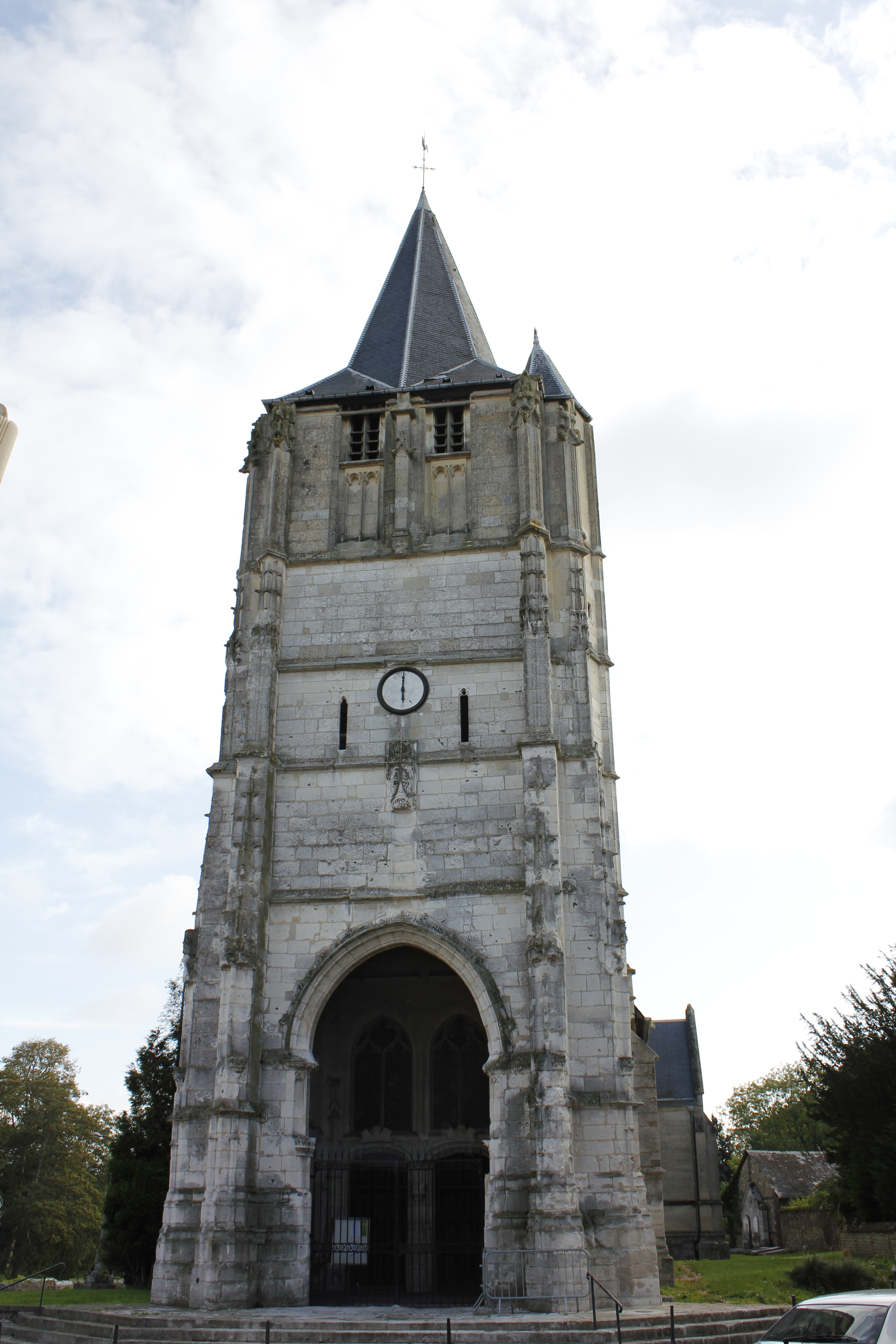 Eglise de Canteleu .